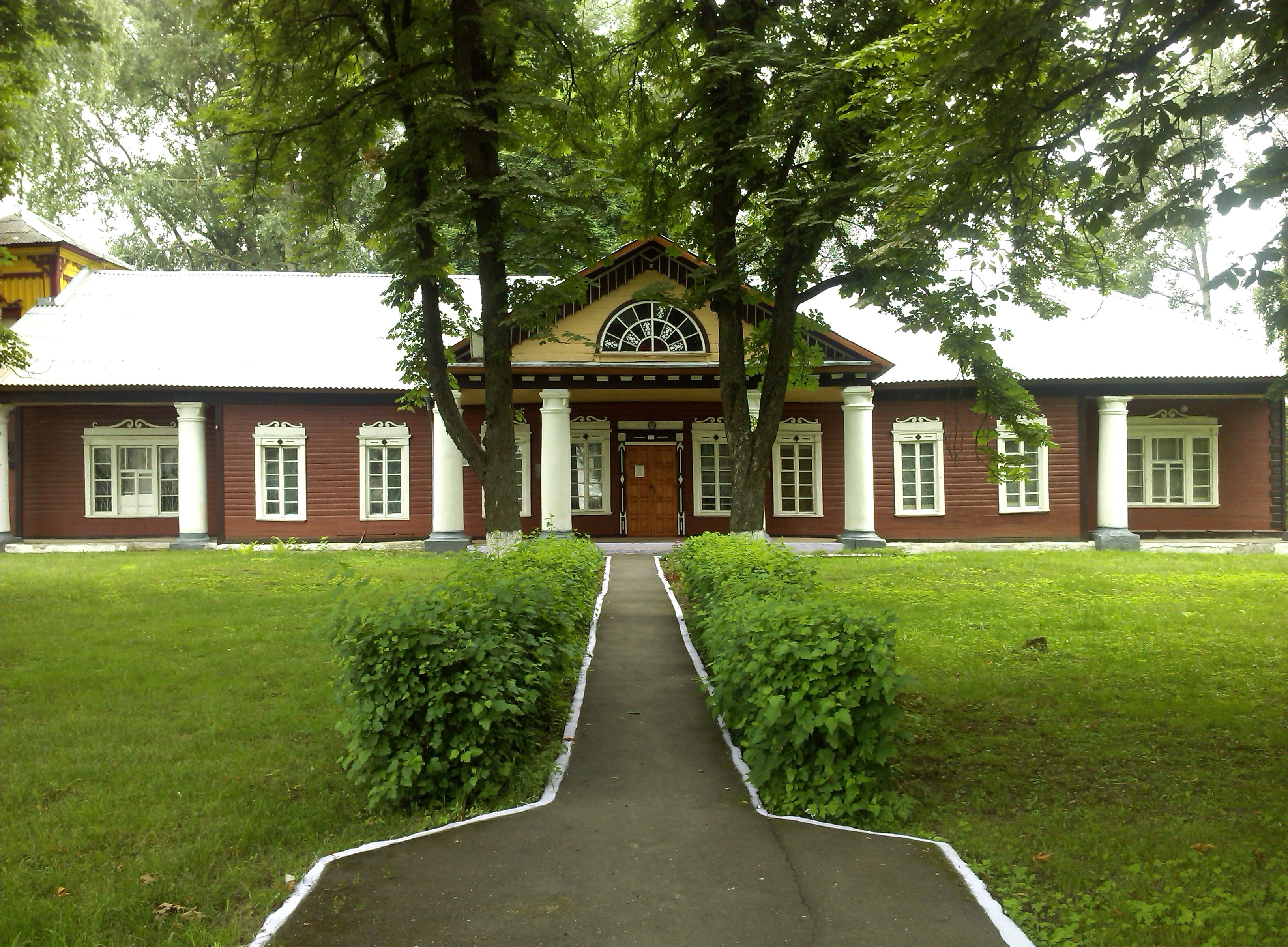 Усадебный дом Бонч-Осмоловских в Блони